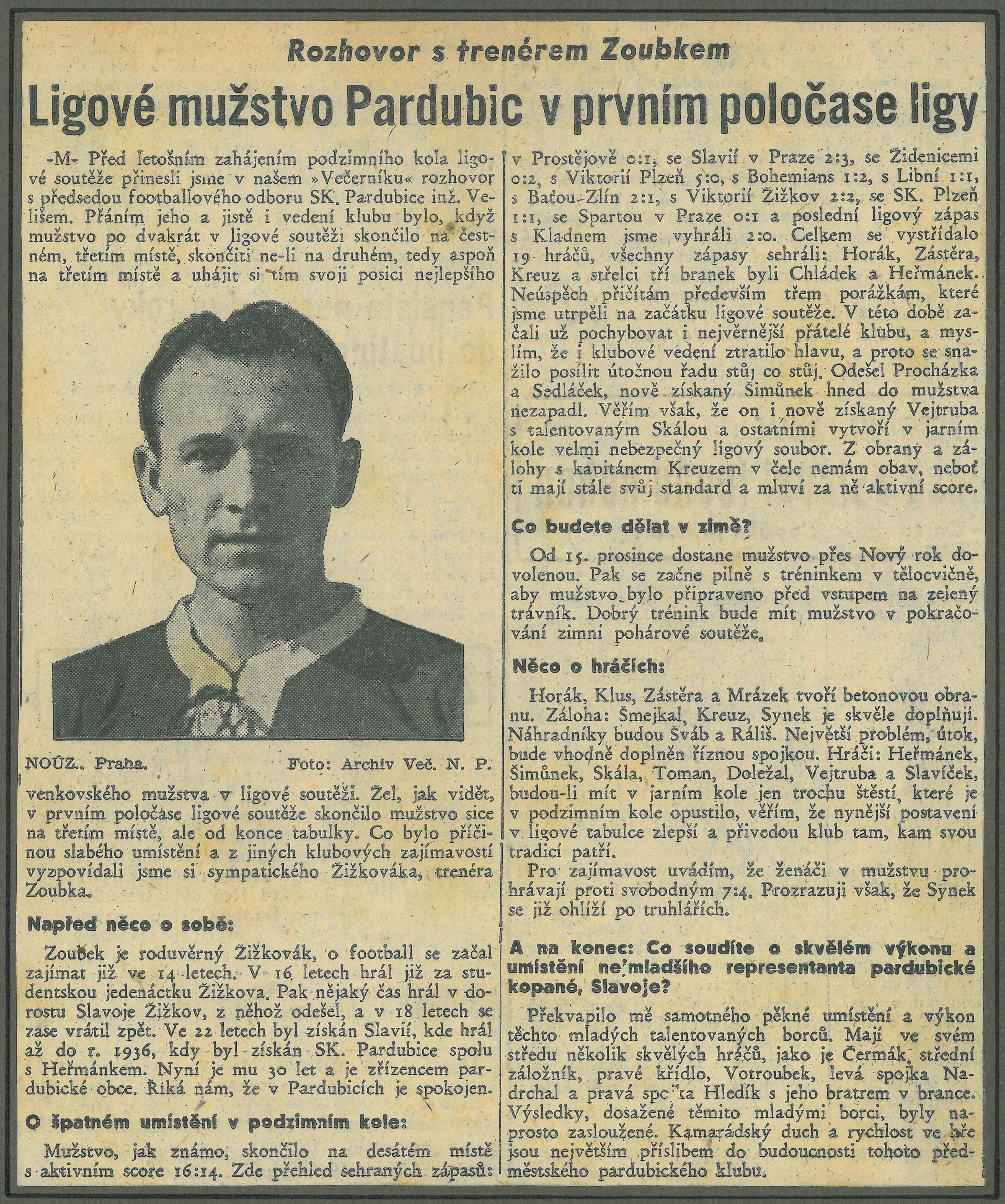 Článek z Národní politiky 1940